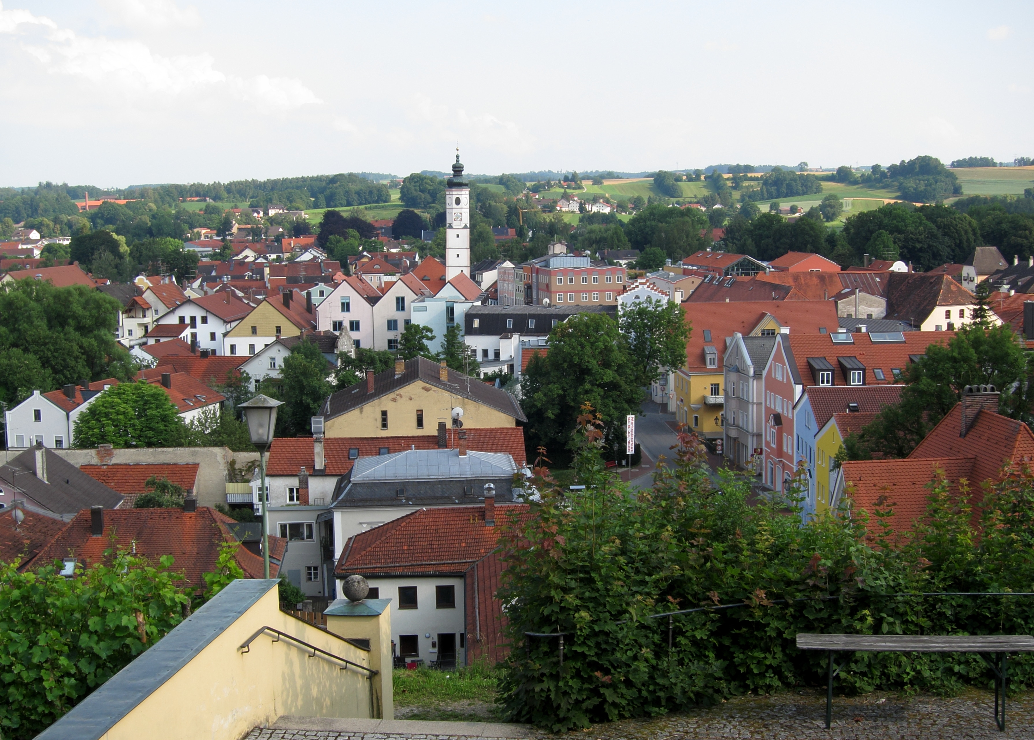 Blick auf Dorfen vom Ruprechtsberg